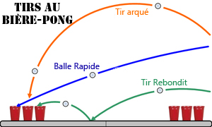 Tirs au Bière-Pong. Français cadien: Tirs au Bière-Pong.